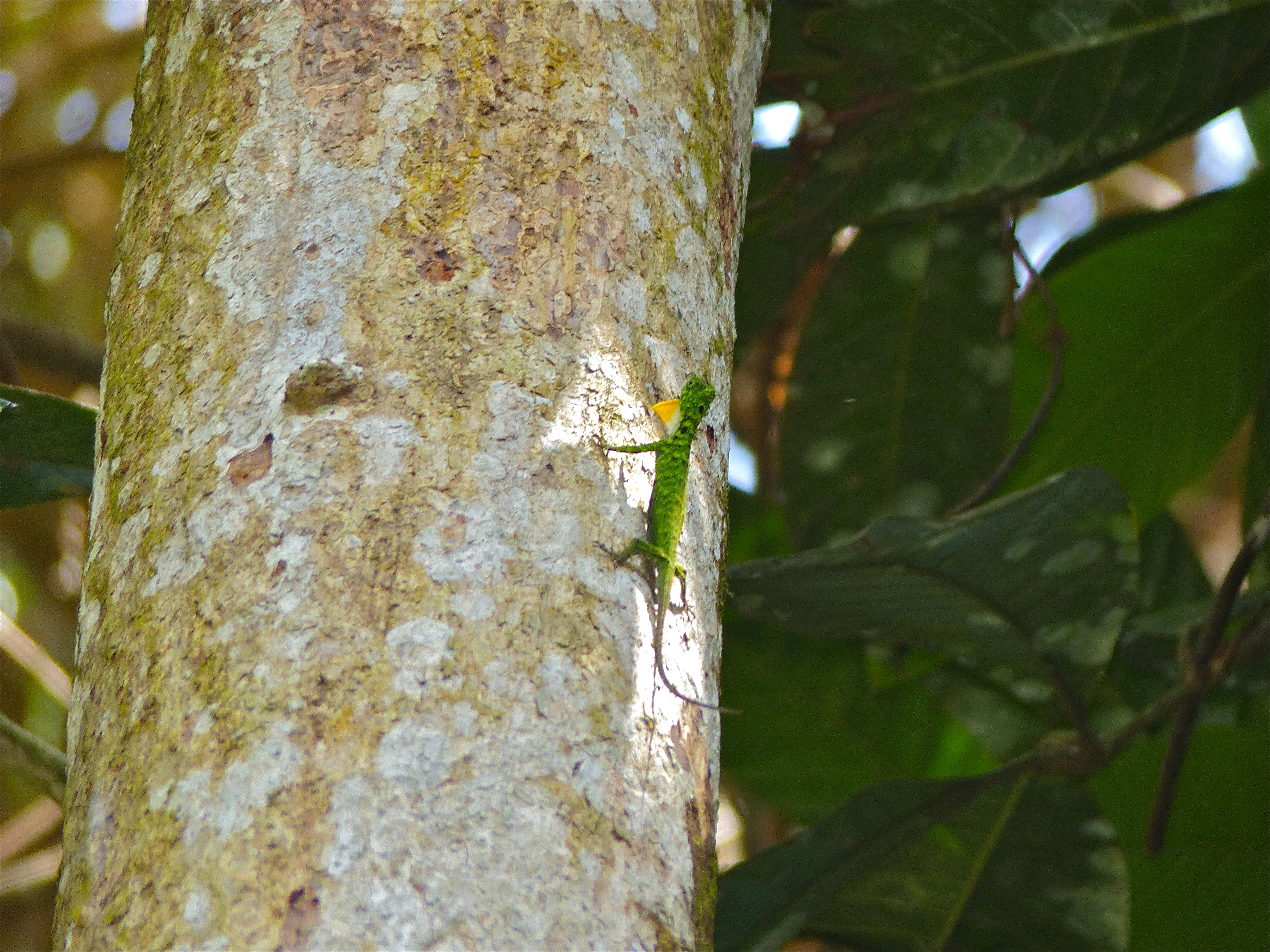 Mulu Headquarters, Mulu NP, Sarawak, MALAYSIA